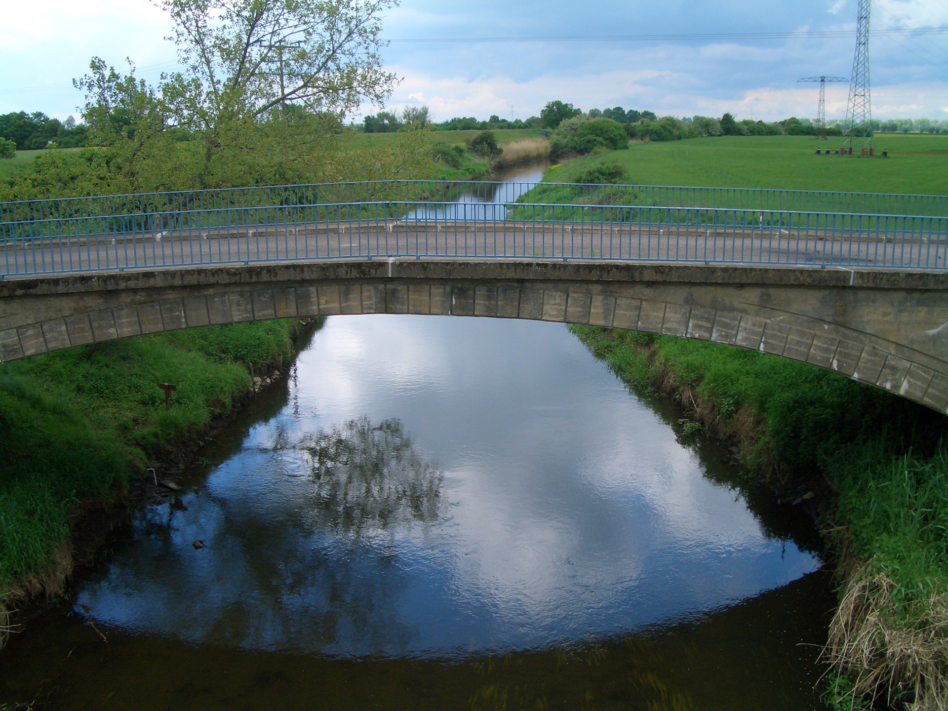 Alte Ohrebrücke südlich von Loitsche im Mündungsbereich zur Elbe.